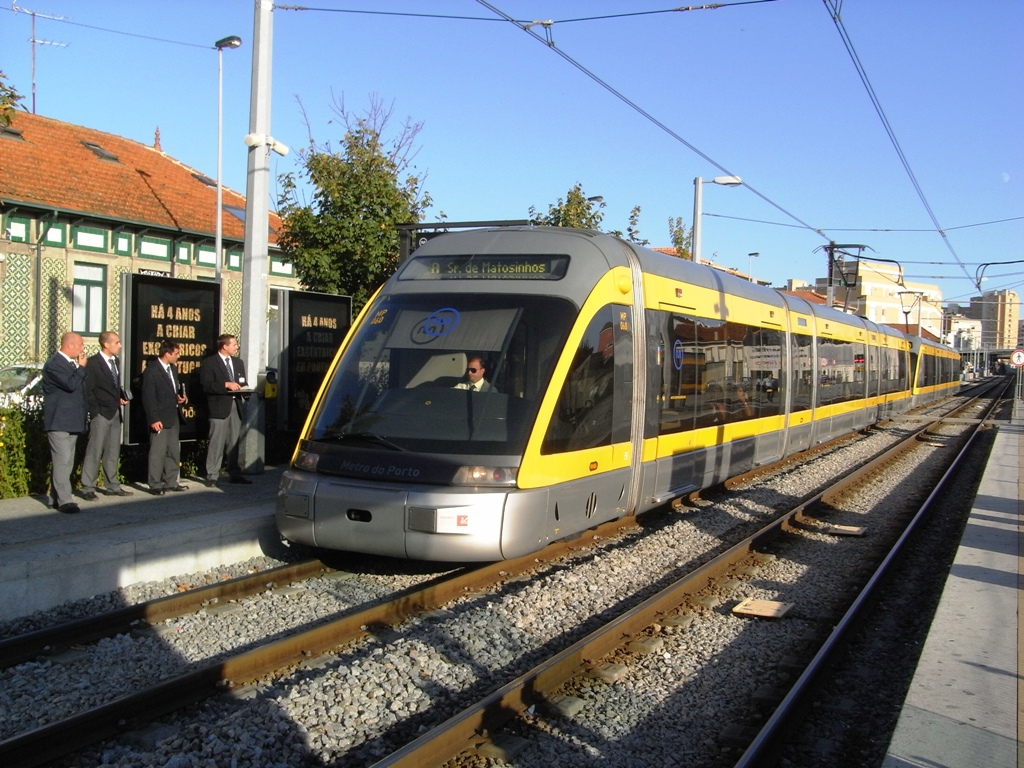 Ver artículo en mi Blog en Enlace See post in My blog at Link Estação de Francos